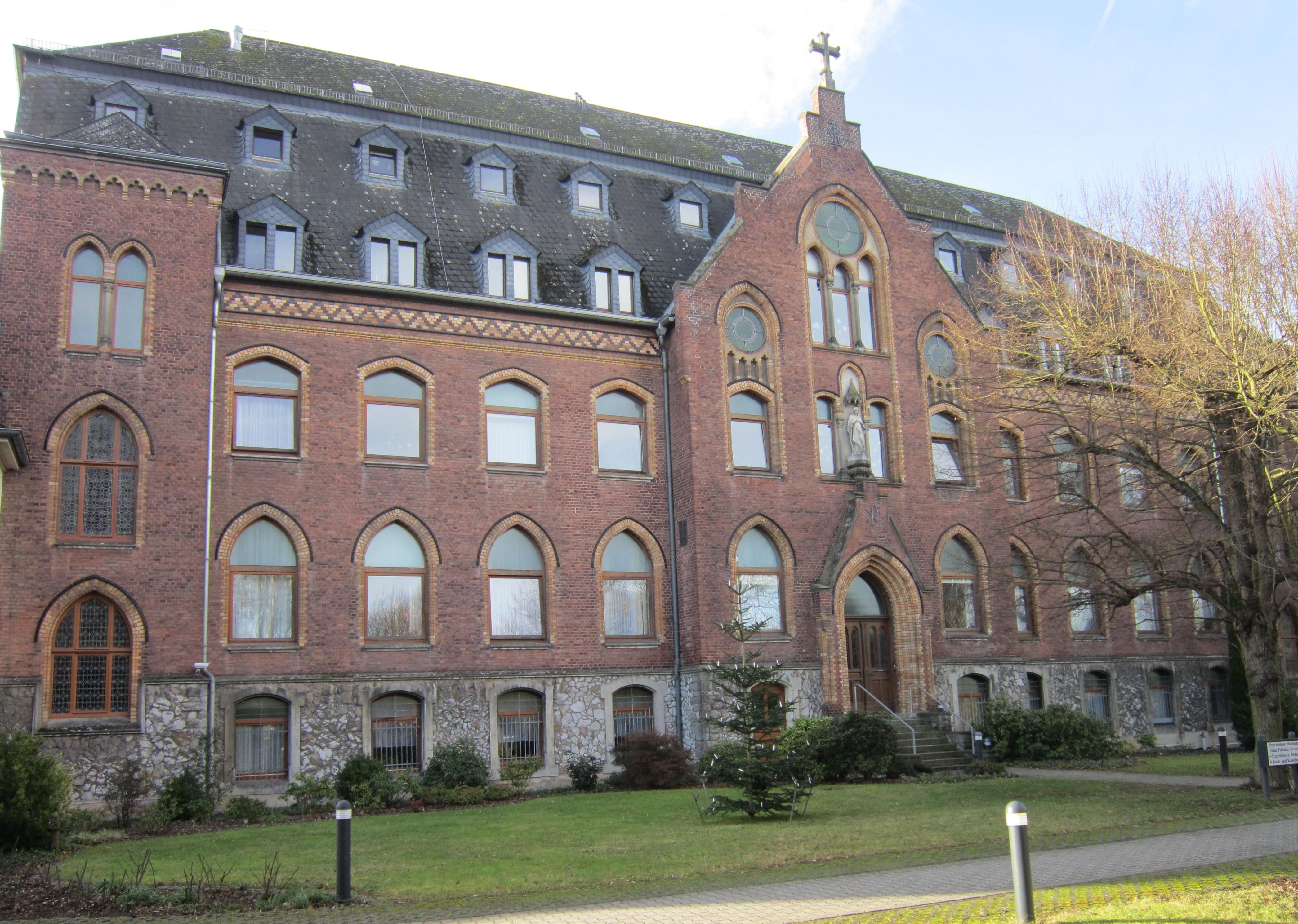 Kloster Marienborn, das Provinzhaus der Pallottinerinnen in Limburg an der Lahn, Deutschland